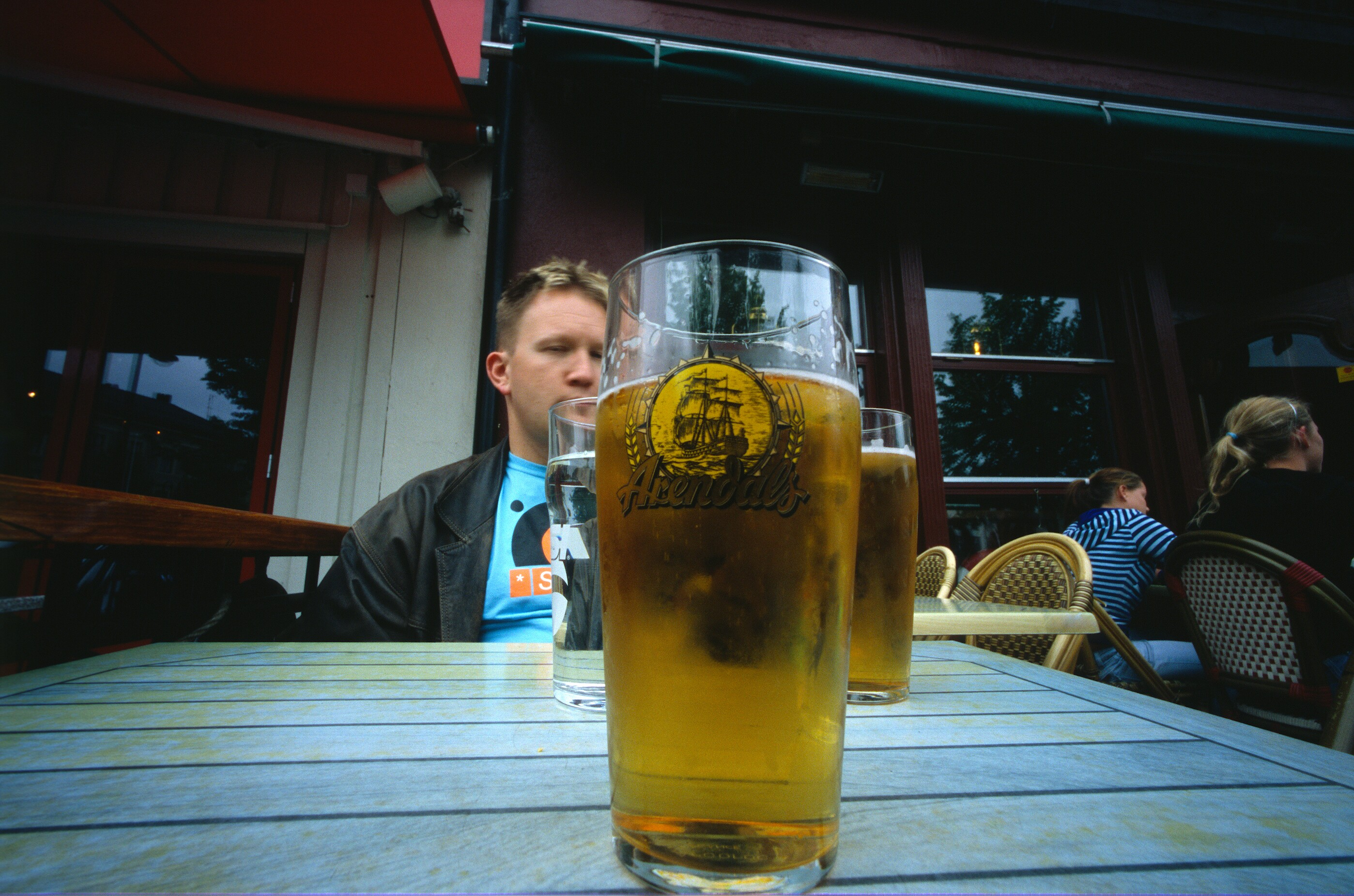 Beer from Arendal brewery, (Arendal Bryggeri)